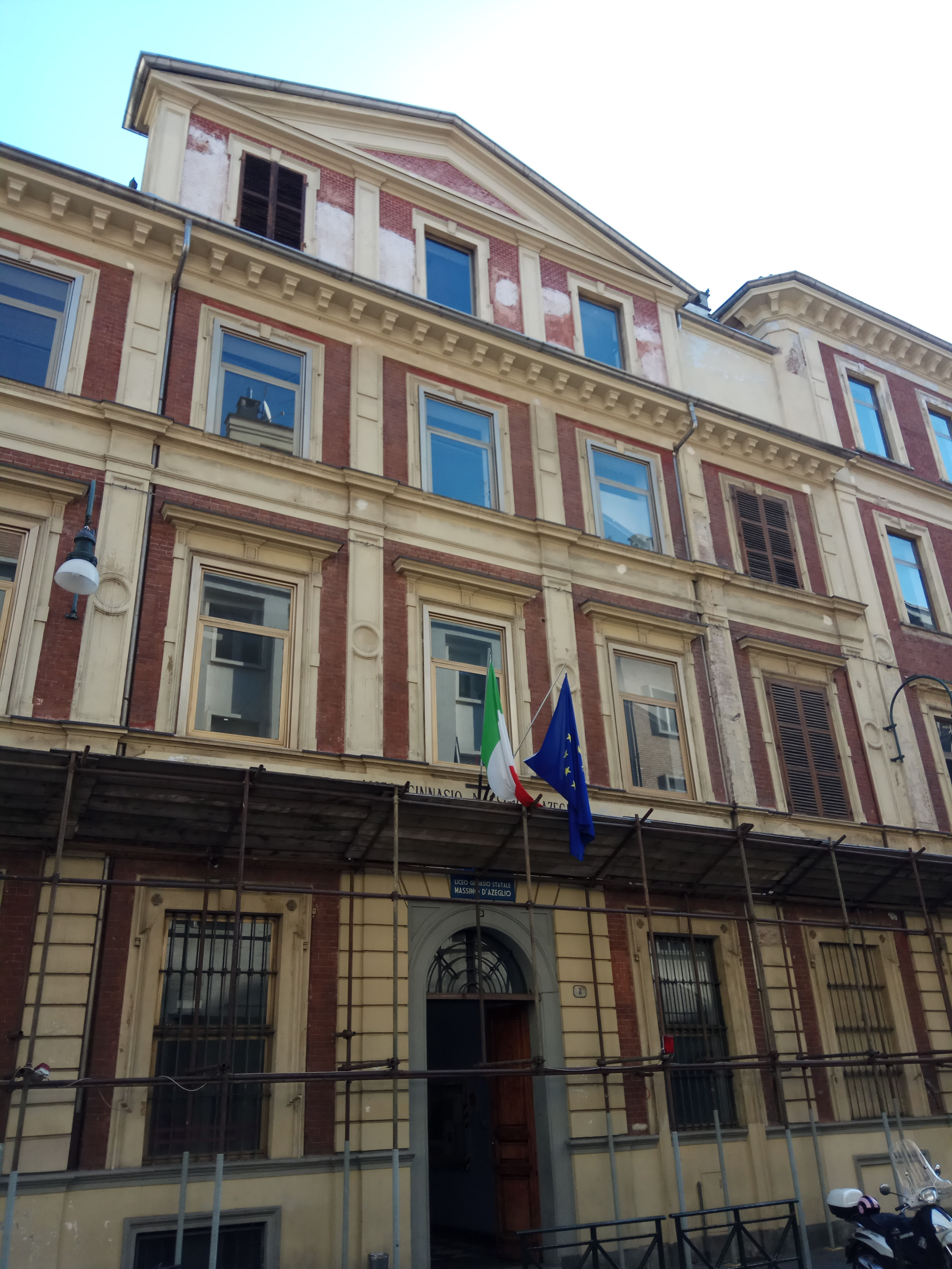 Massimo D'Azeglio Liceo Building